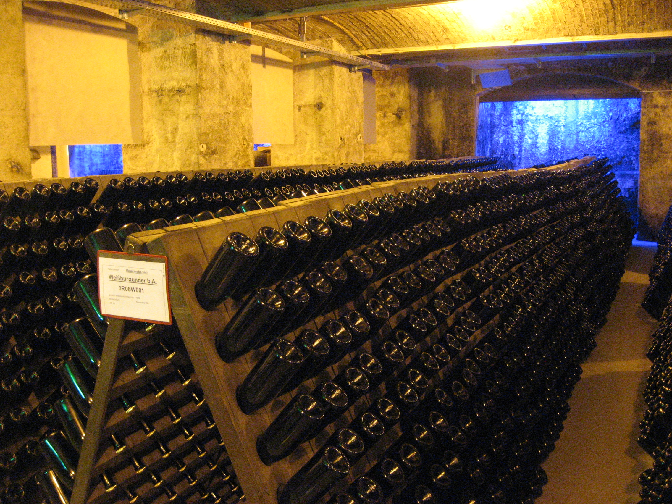 Rotkäppchen Sektkellerei Freyburg (Unstrut), Rüttelpulte